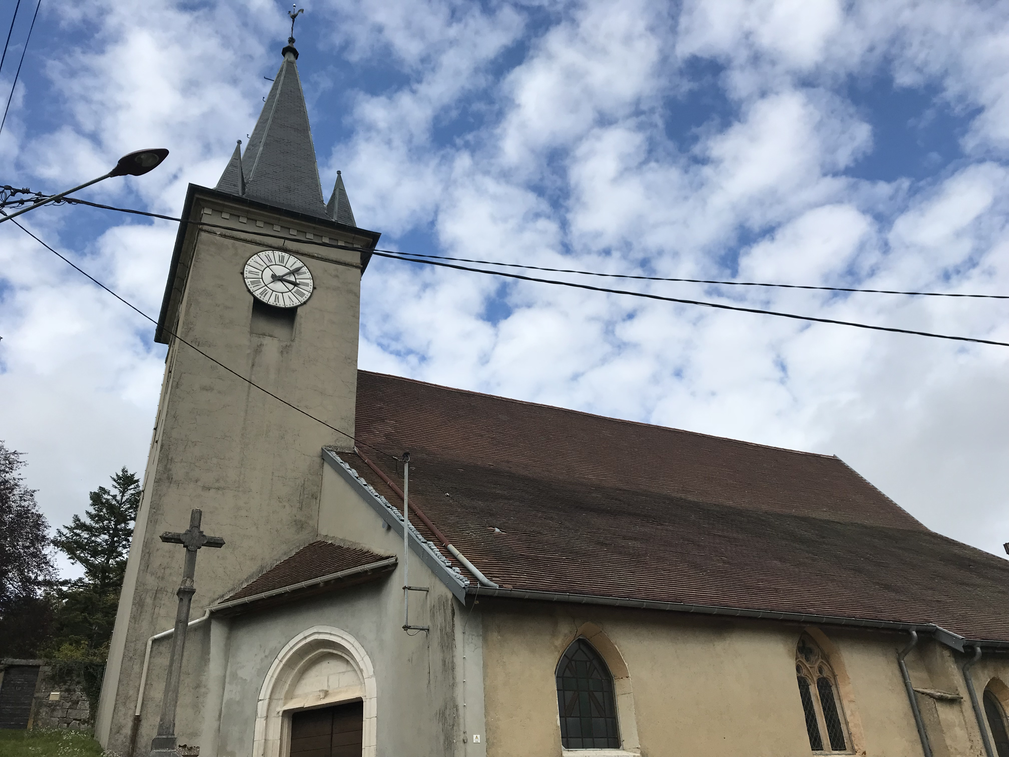 Commune de Montfleur (Jura, France) en octobre 2017.